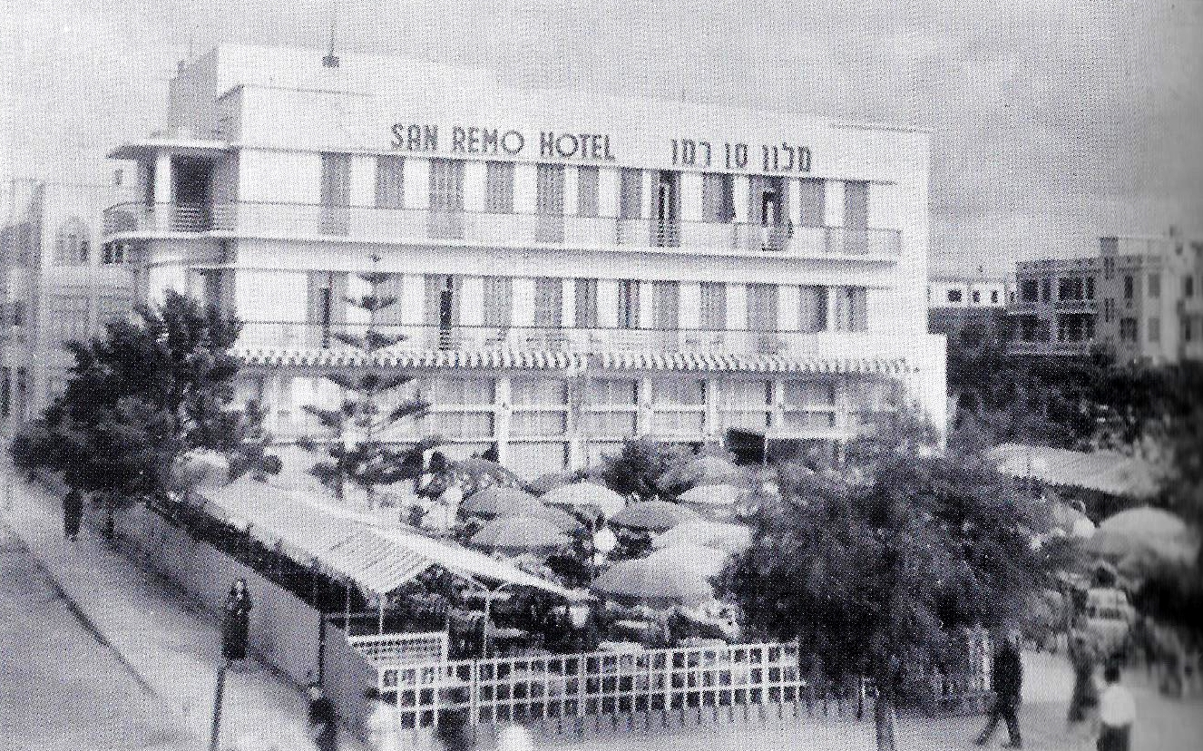 מפקדת השירות הימי במלון סן רמו רח' הירקון פינת רח' הירדן תל אביב 1948